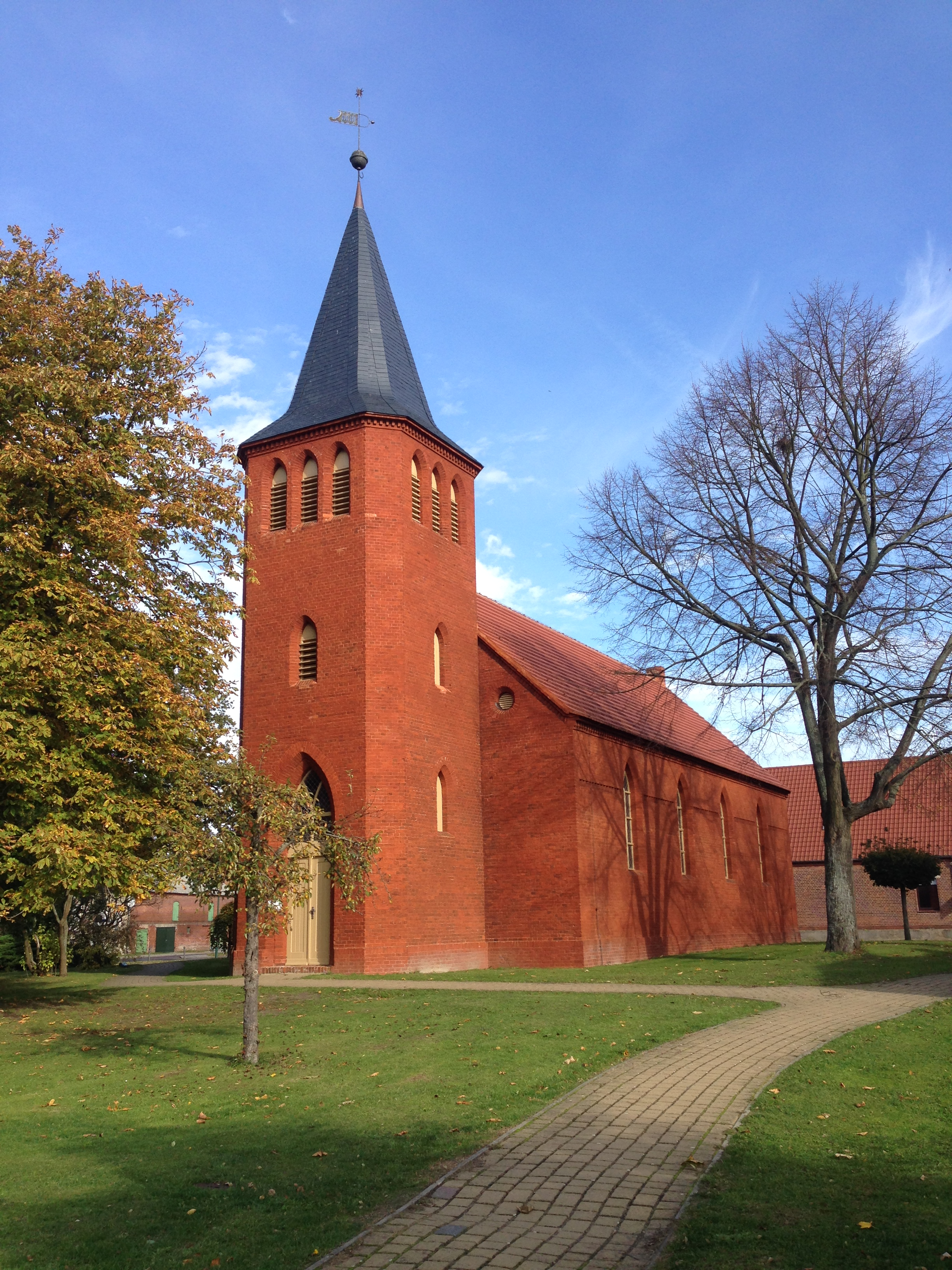 Dorfkirche Kleinwusterwitz, Ansicht von Westen, Oktober 2013